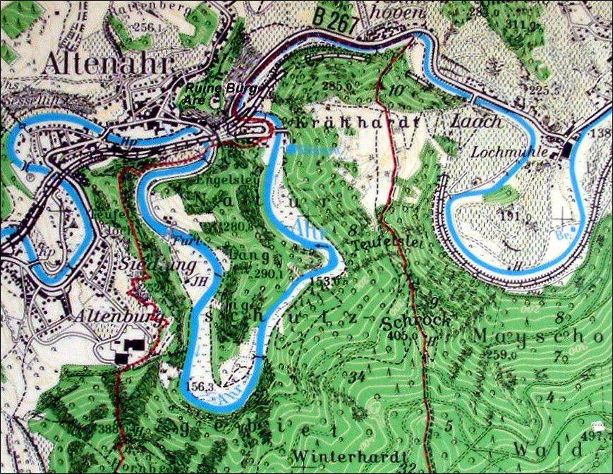 Castle Are - Public sign; Öffentliche Hinweistafel der Burg Are und Umgebung, Ausschnitt aus image:burgareplno.jpg